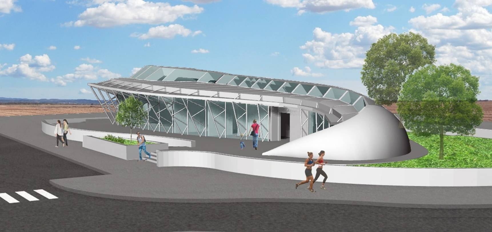 Bodek Architects Nisanit Culture Center